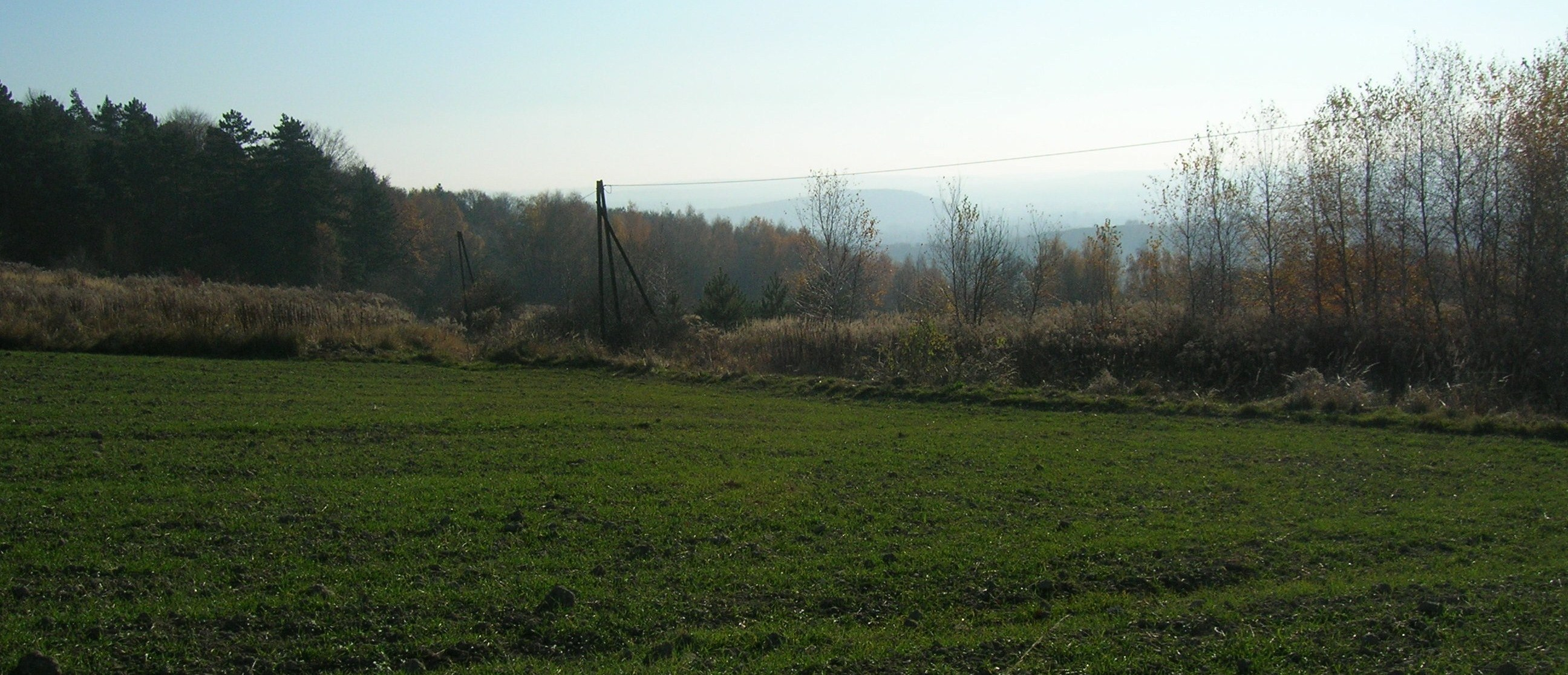 Barlówka.Las.